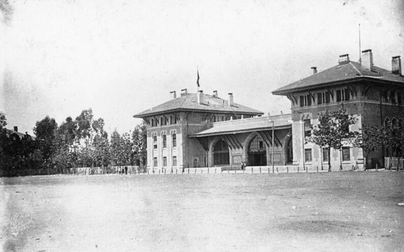 Kleinasien-Adana, Bahnhof Kleinasien/Türkei.- Adana, das von der Bagdadbahn Gesellschaft zwischen 1910 und 1913 erbaute Stationsgebäude (Stadtseite).